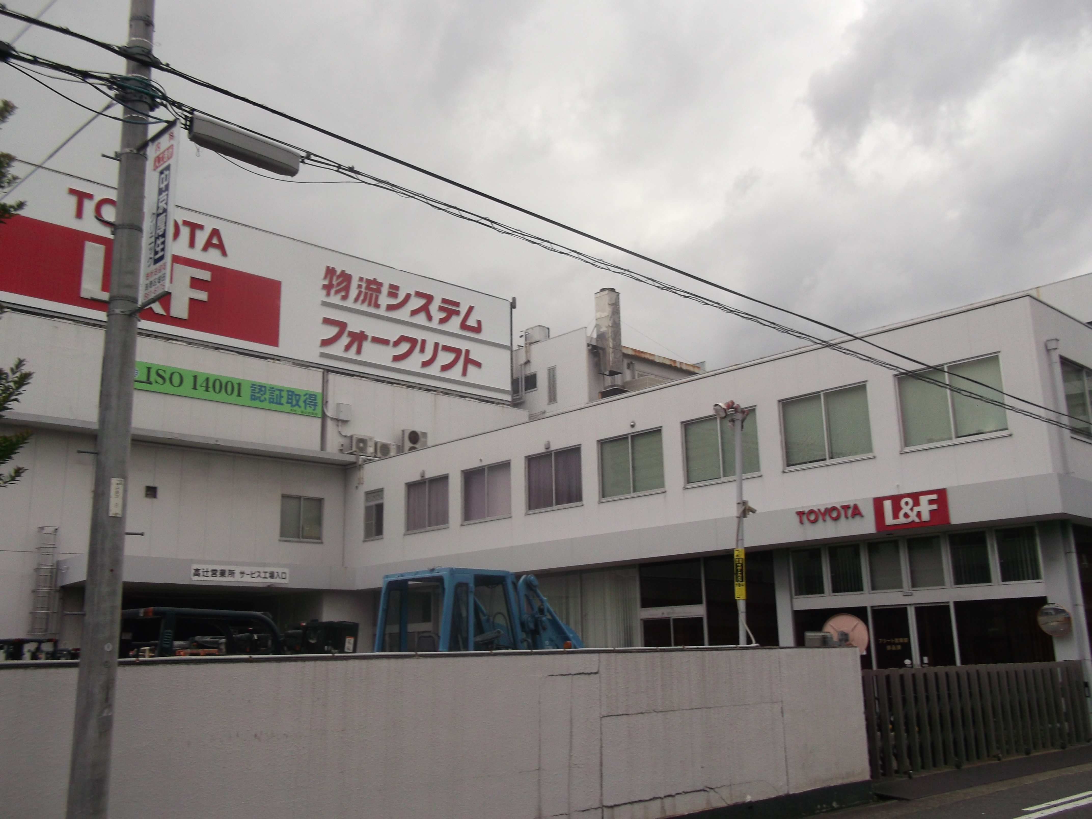 名古屋市昭和区白金のトヨタL&F中部本社を東側公道南側より撮影